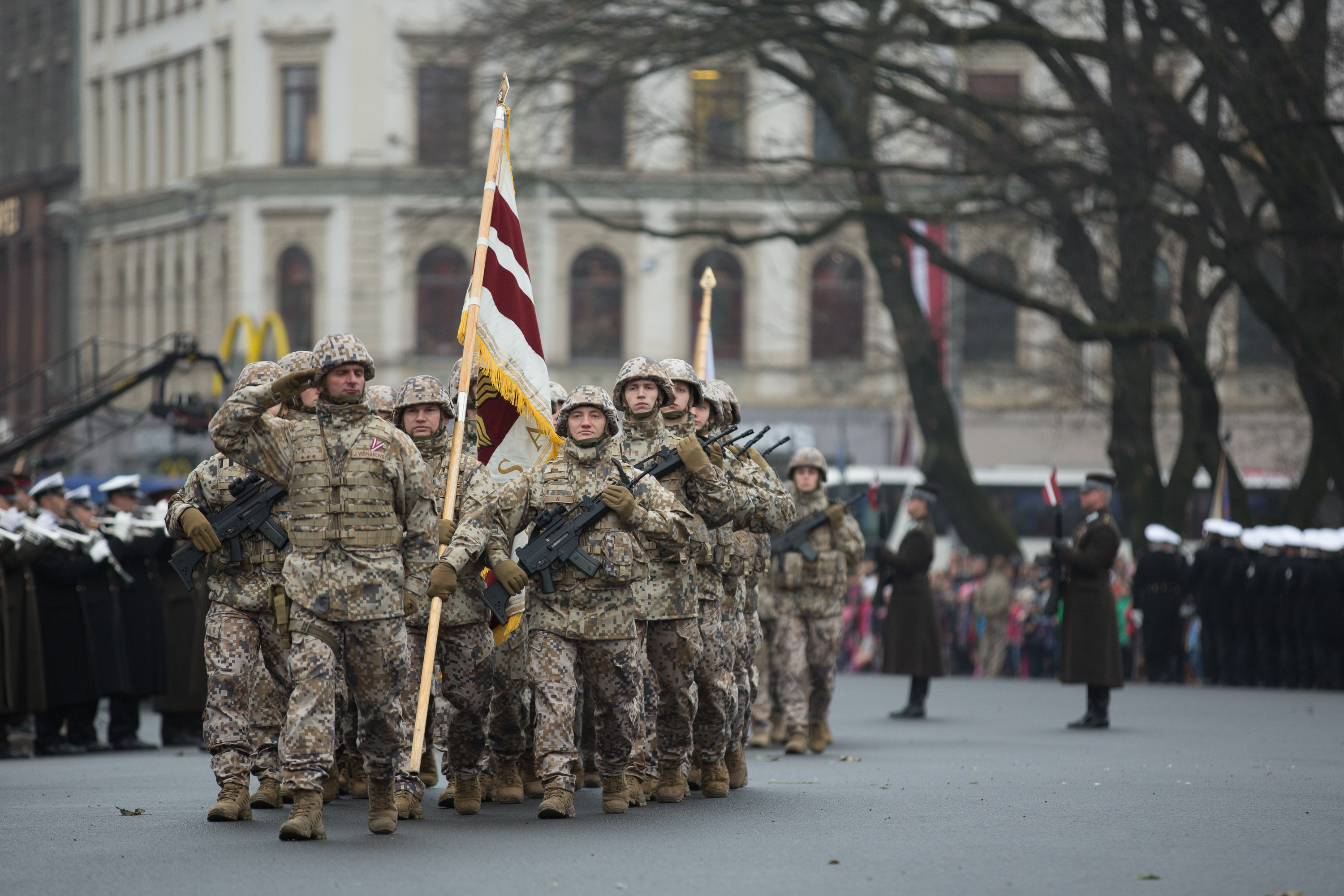 2014.gada 11.novembris. Nacionālo bruņoto spēku un Iekšlietu ministrijas vienību militārā parāde pie Brīvības pieminekļa. Foto: Ernests Dinka, Saeimas Kanceleja Izmantošanas noteikumi: saeima.lv/lv/autortiesibas